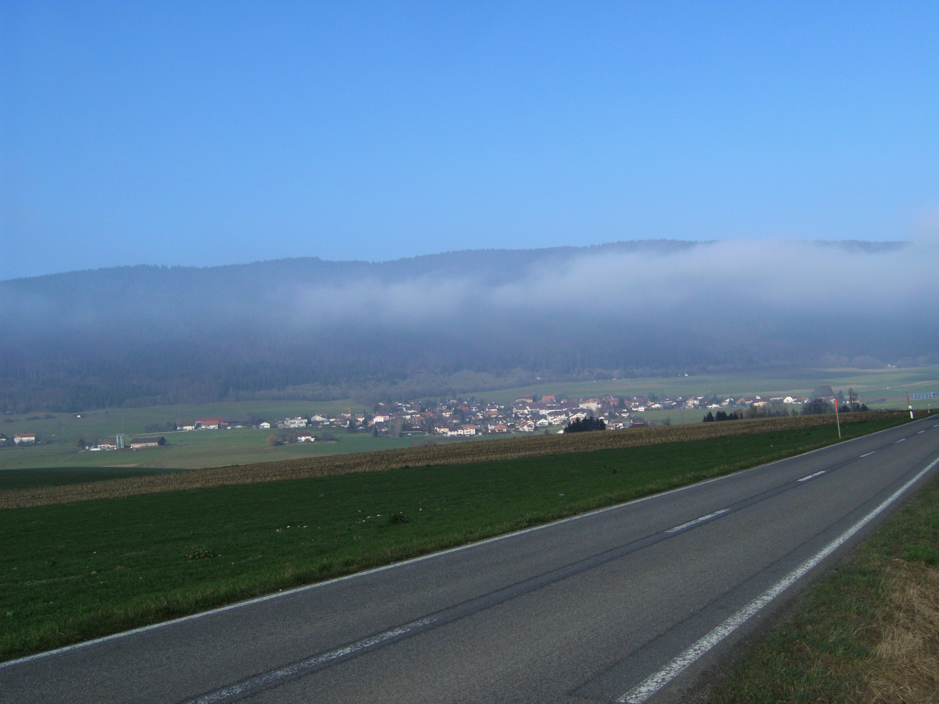 Prise de vue de la commune de Lamboing (canton de Berne, Suisse). Prise de la photo : depuis Prêles en direction du nord. Coordonnées suisses : 576.975/217.150